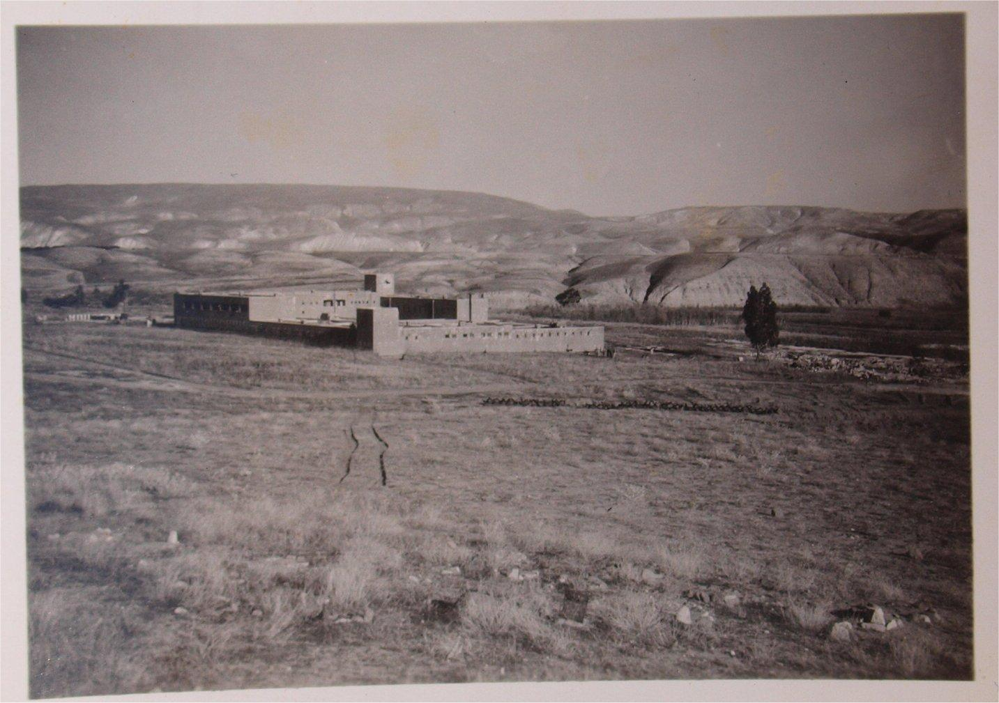 מבט מרחוק על משטרת גשר בעמק הירדן בדצמבר 1948.